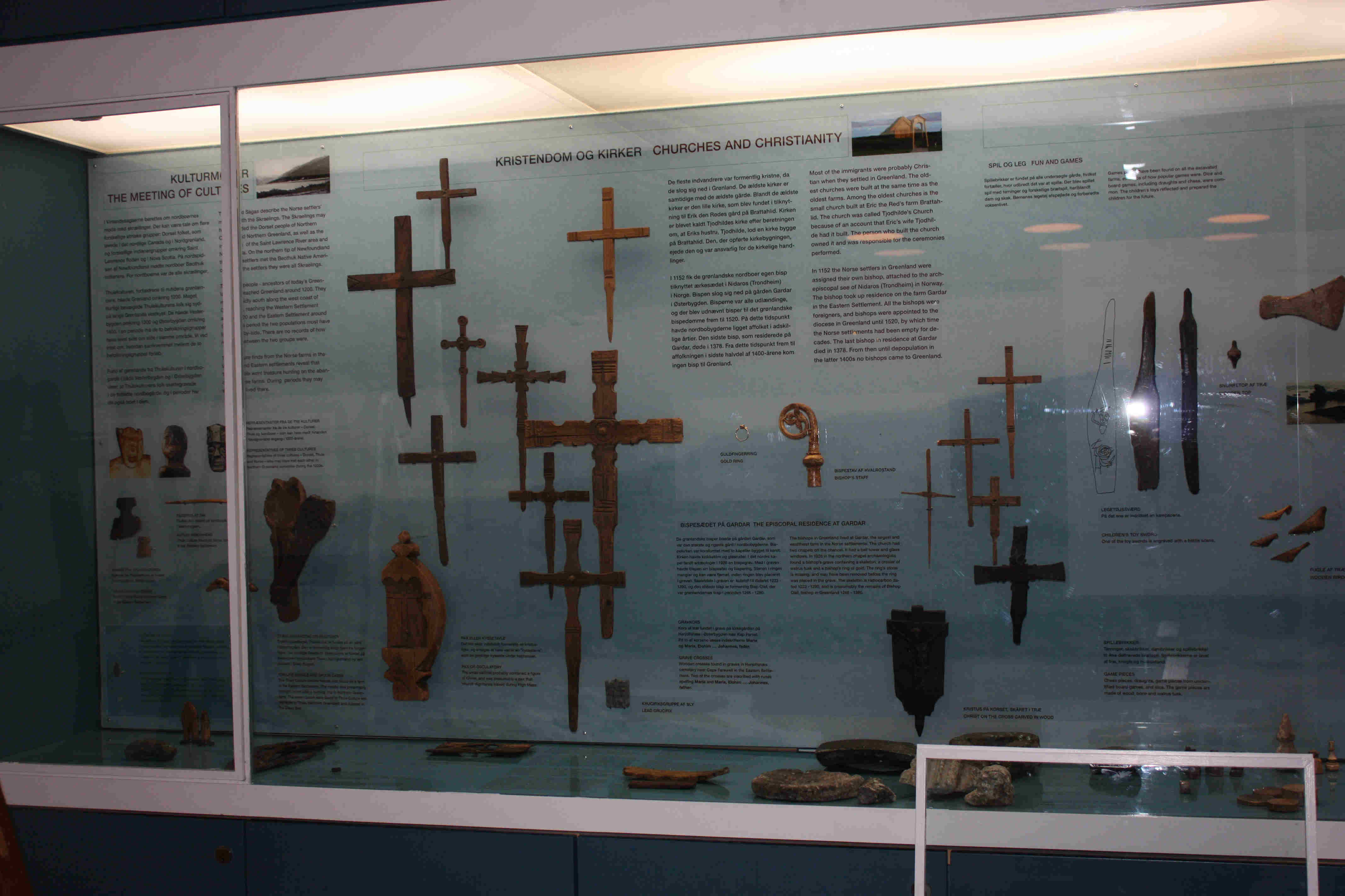 trækors